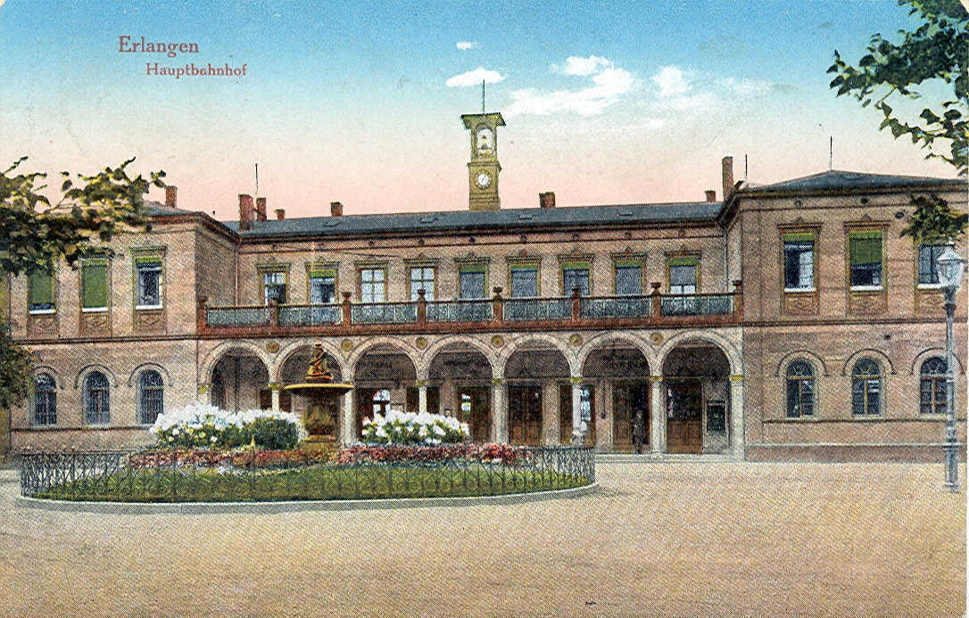 Postkarte, datiert 3.3.1917. Beschriftung: "Erlangen - Hauptbahnhof"